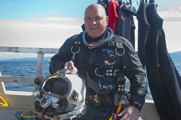 La Senora Concepcion